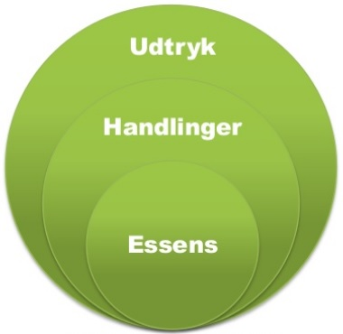 Branding Circle